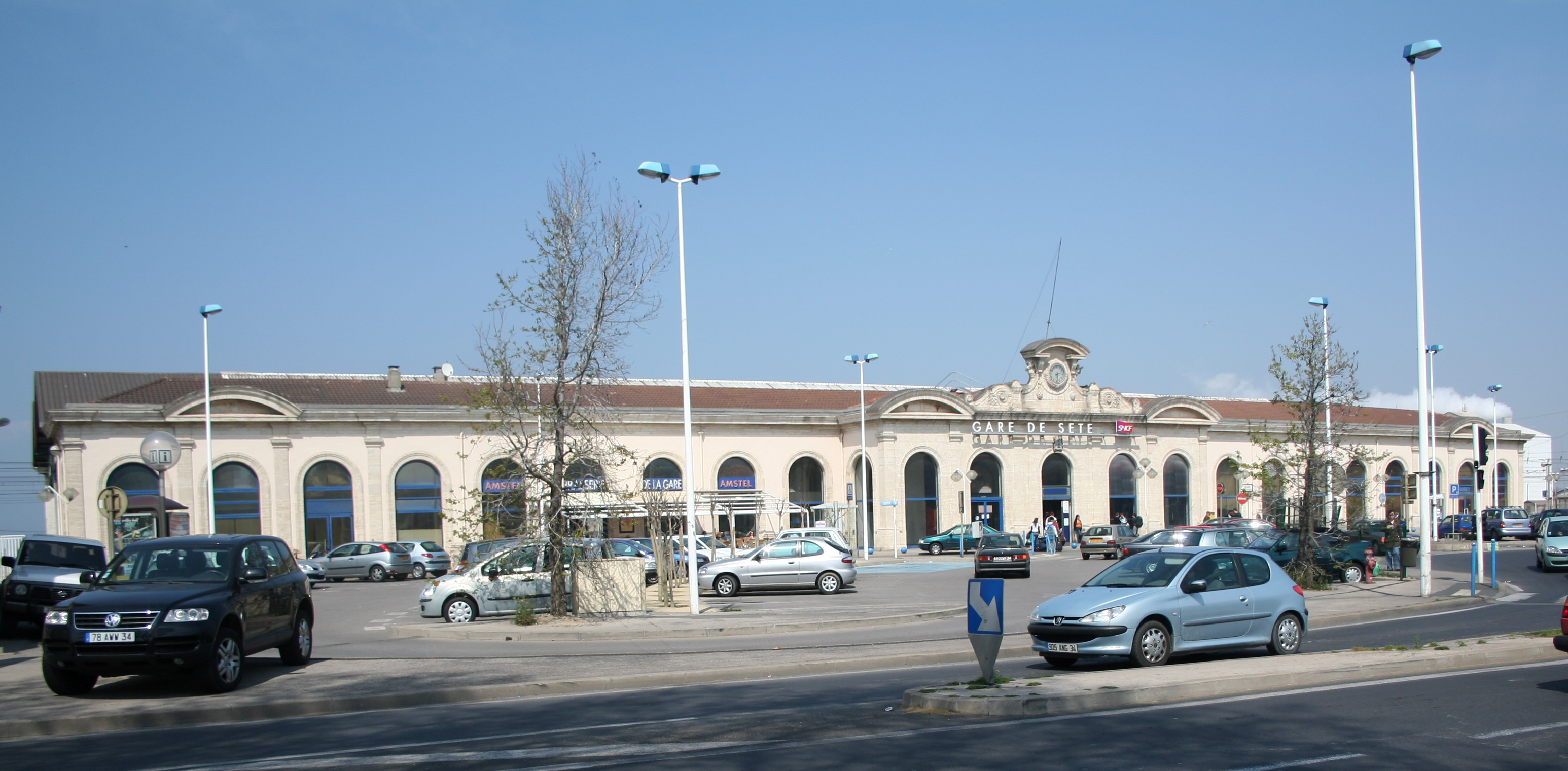 Sète (Hérault) - Gare.